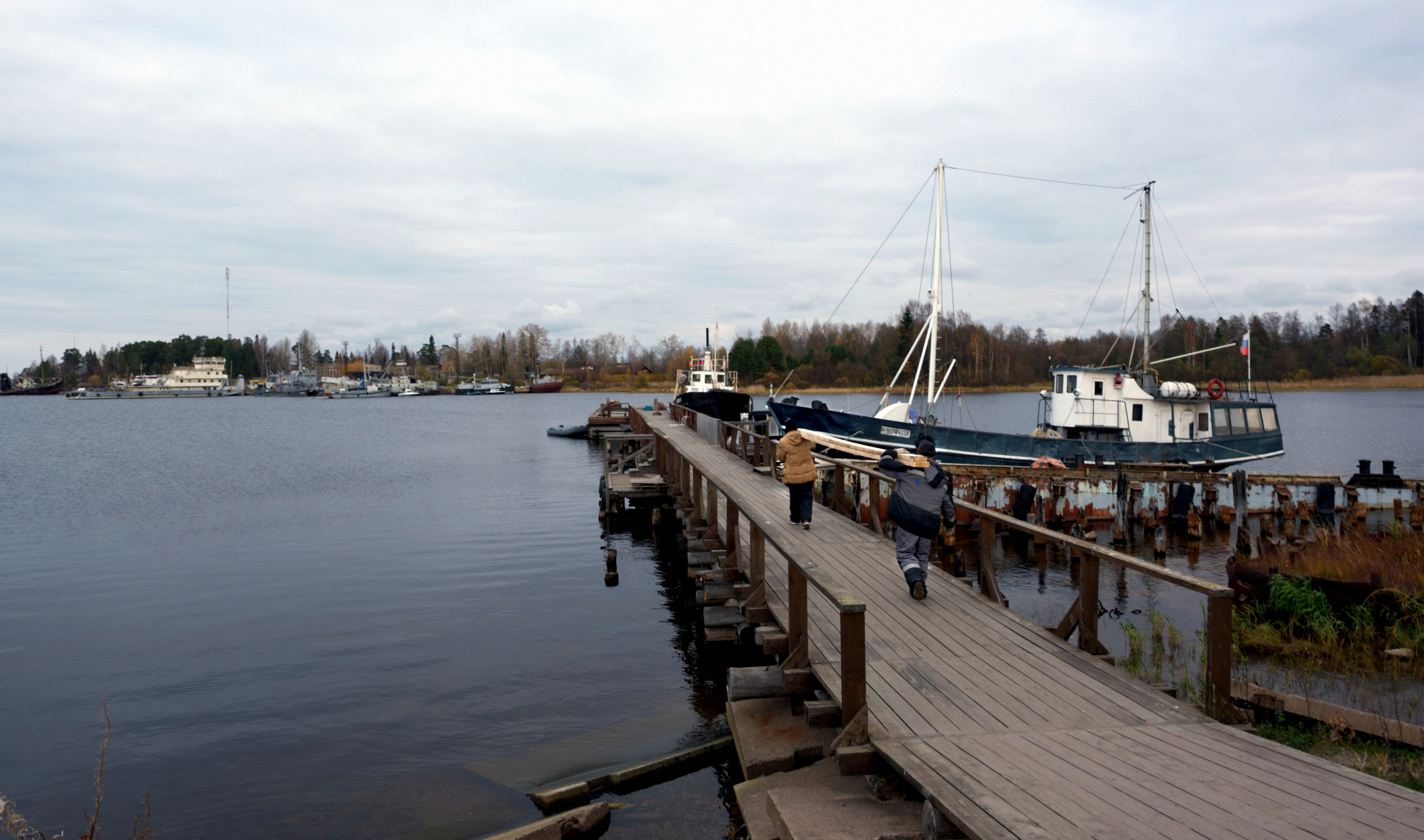 Sortanlahti, Pyhäjärvi 24.10.2016